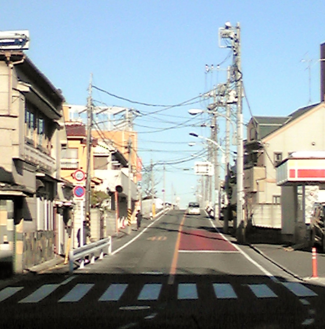 東京都道446号長後赤塚線終点